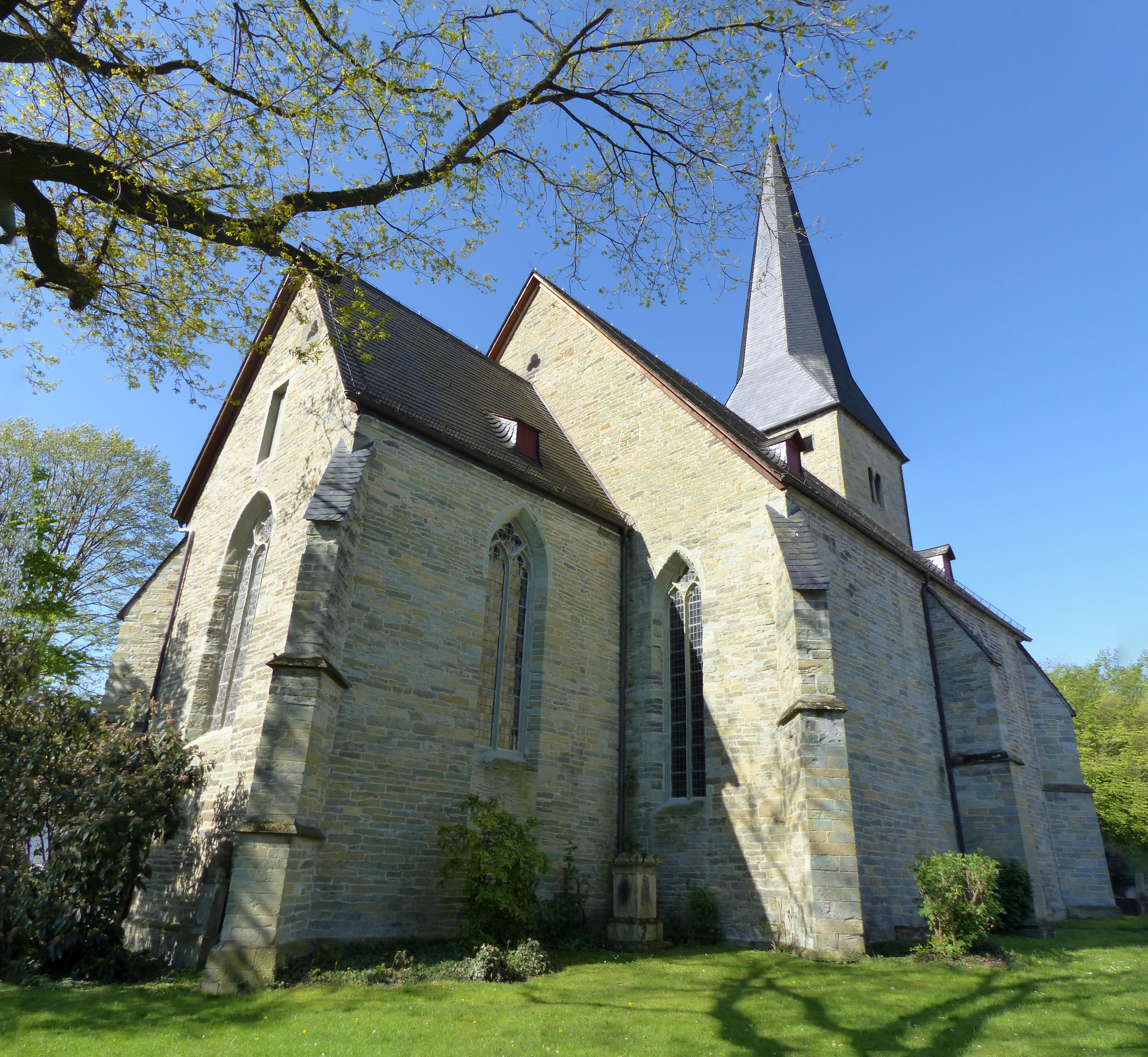 Bad Sassendorf – Evangelische Kirche Sst. Simon und Judas Thaddäus aus dem 15. Jahrhundert